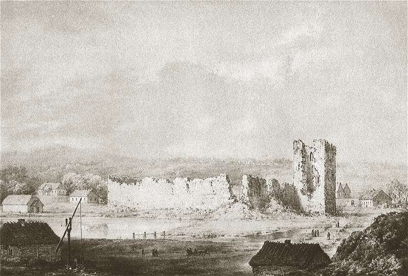 Kreva Castle, Belarus